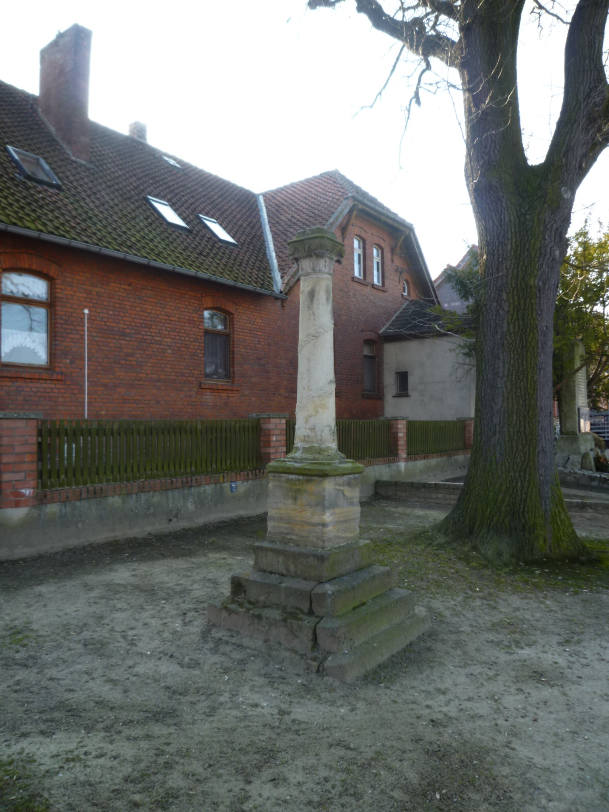 Kriegerdenkmal in Mannhausen (Calvörde), Deutsch-Französischer Krieg 1870/1871 Seitenansicht